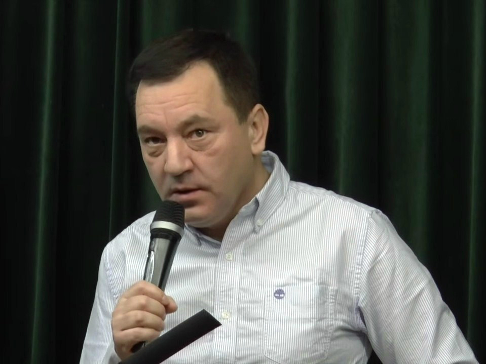 Igor Witkowski, pisarz i dziennikarz zajmujący się techniką wojskową oraz II wojną światową.